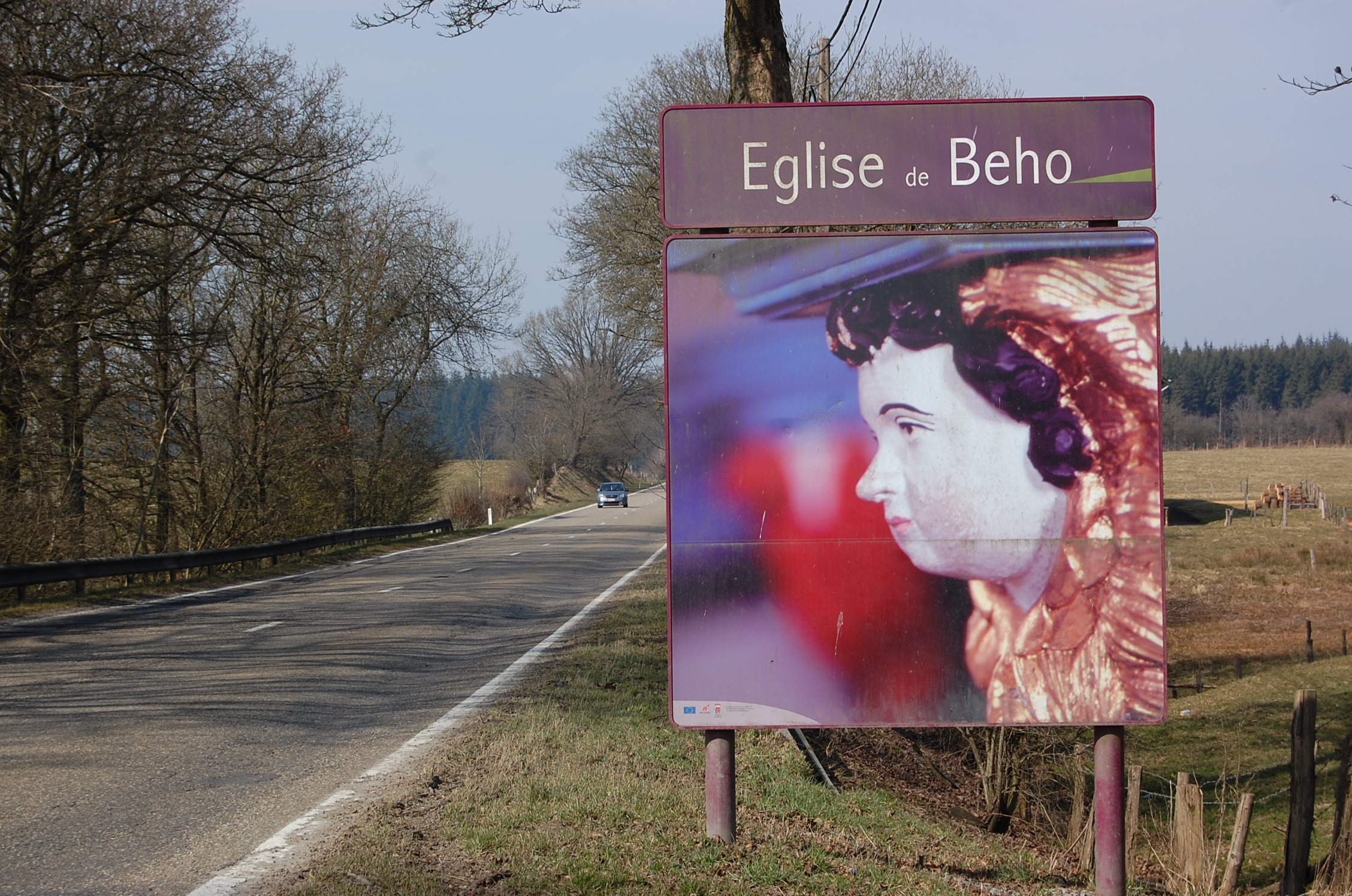 Walon: plake sol voye po fé viziter l' eglijhe di Bhô